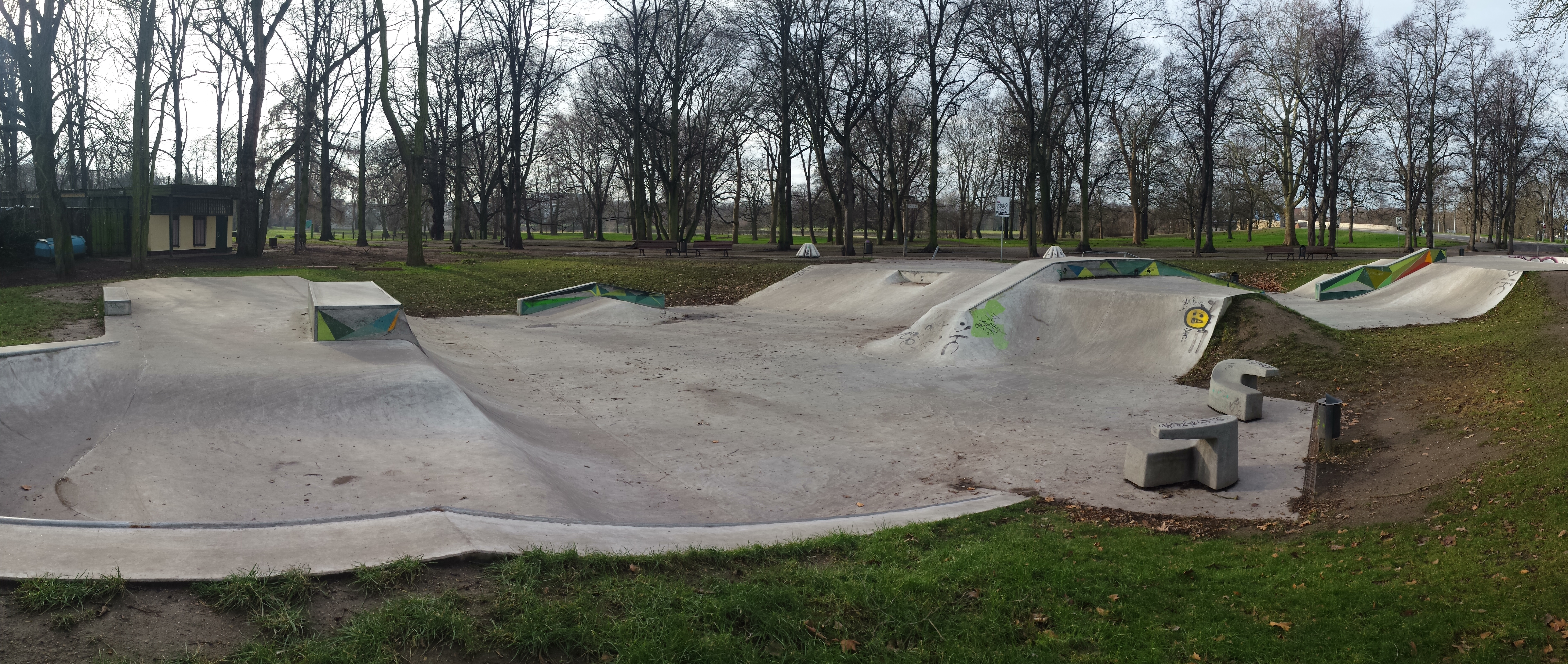 Moderner Skatepark im Rotehornpark Magdeburg